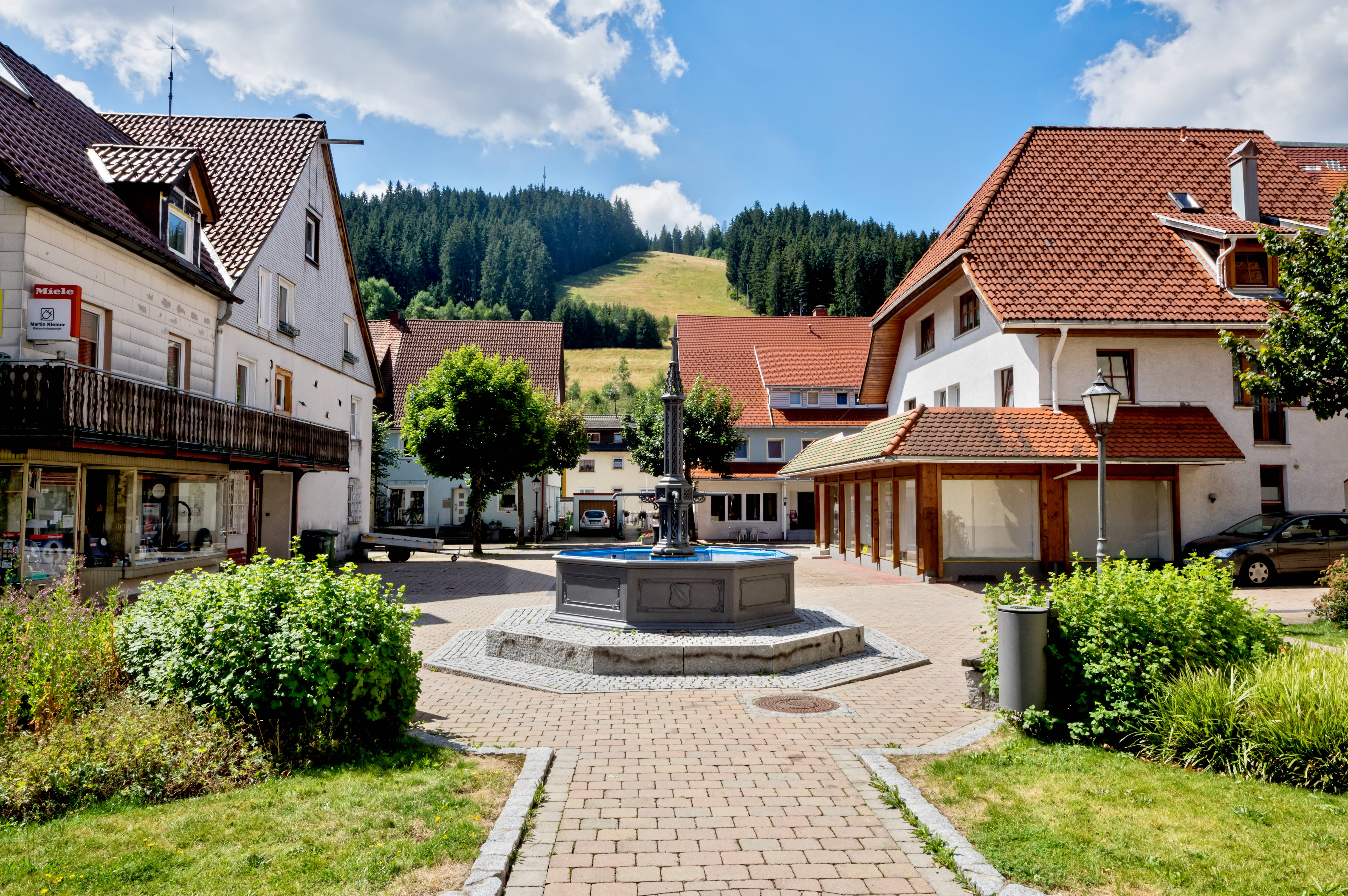 Bilder aus Vöhrenbach